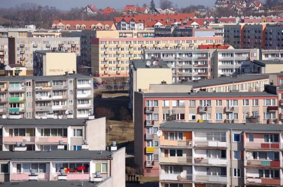 Blokowisko w Giżycku